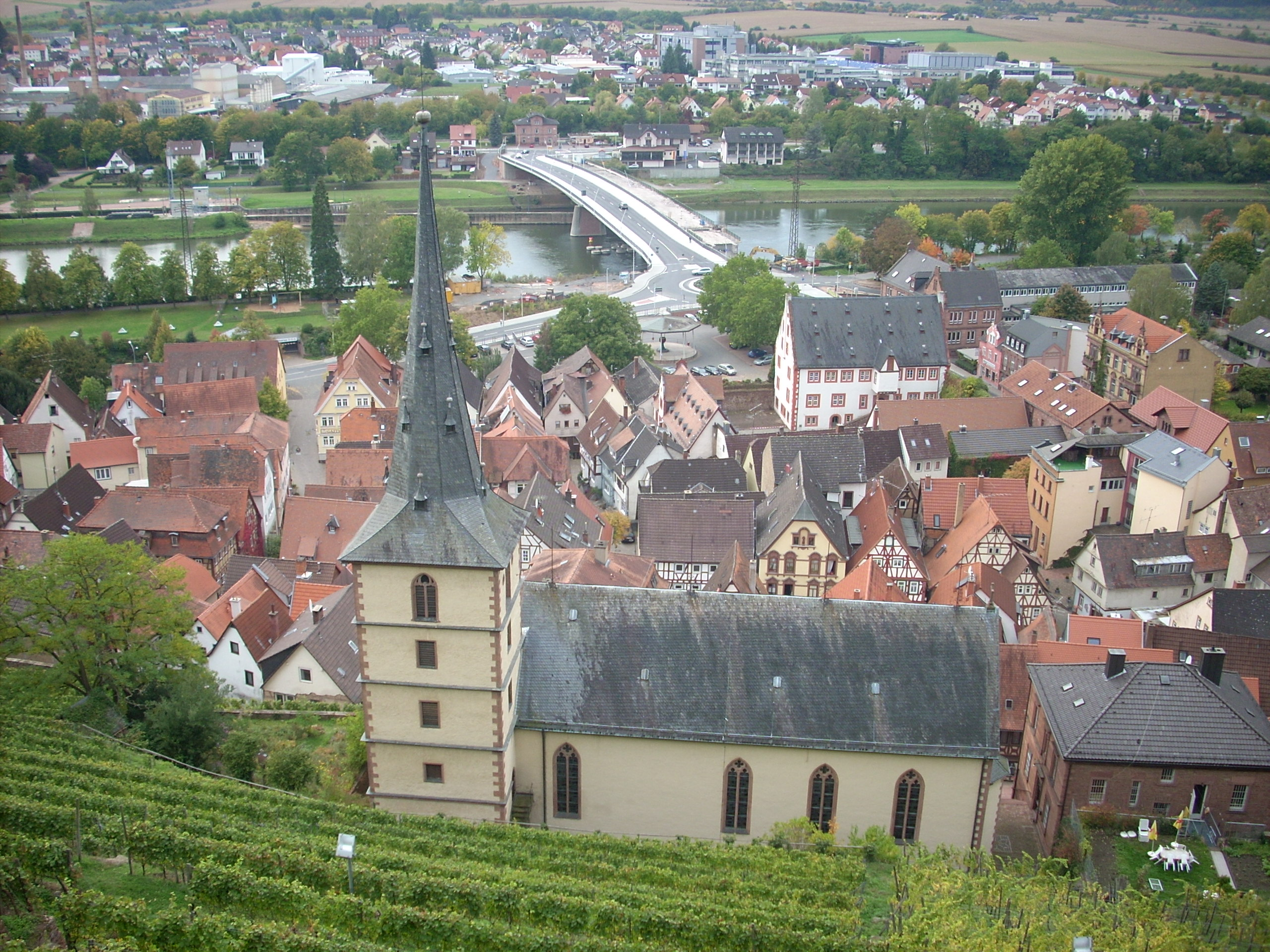 Altstadt in Klingenberg am Main mit neuer Mainbrücke im Hintergrund